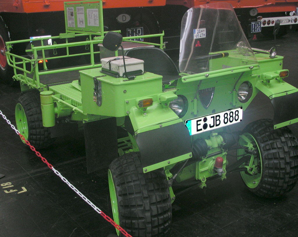 Hannover, Nutzfahrzeug-IAA. FAUN Kraka, 1962 entworfen, "LIPSOID"-Reifen ab 0,5 bar, Goggomobil-Motor, 400 ccm, 12 Kw, 15,5 PS. Das Fahrzeug ist zusammenklappbar und kann aus der Luft am Fallschirm abgeworfen werden